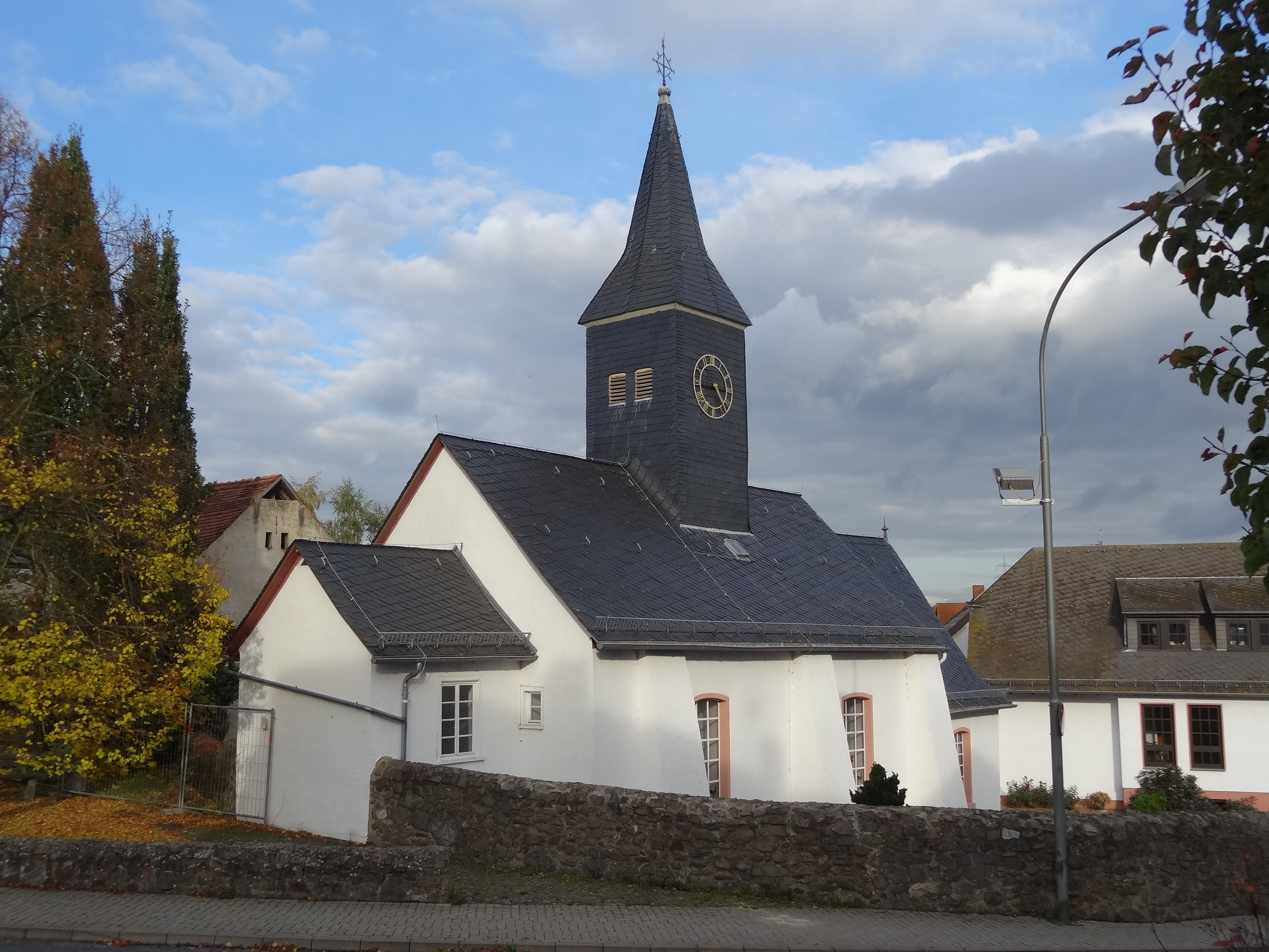 Südwestseite der evangelischen Kirche Allendorf/Lahn